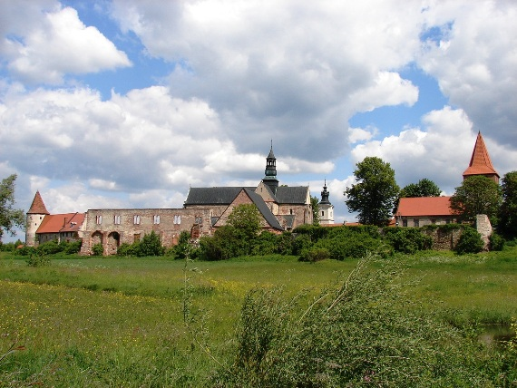 Panorama Klasztoru Cystersów w Sulejowie - Podklasztorzu